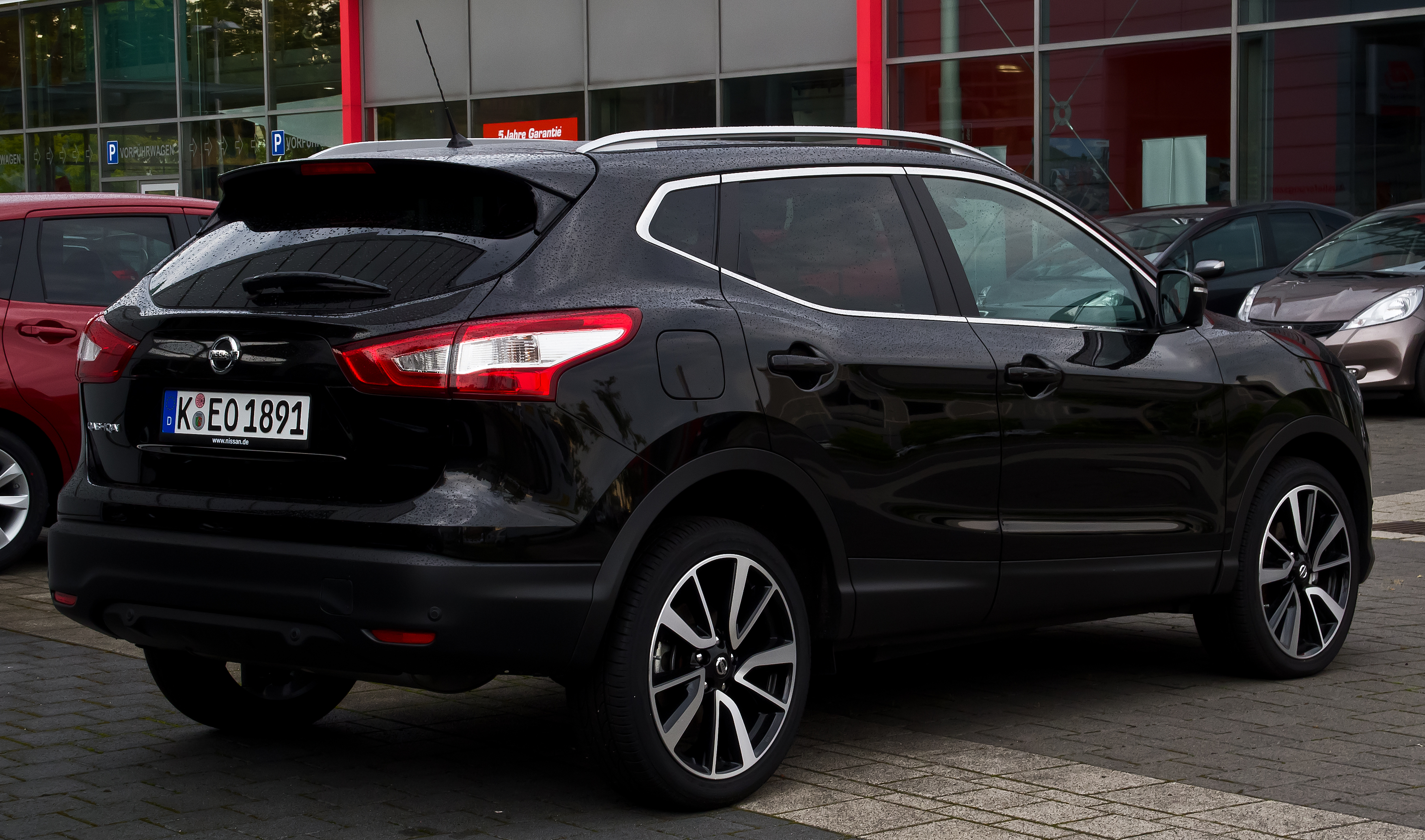 Nissan Qashqai Tekna (II)